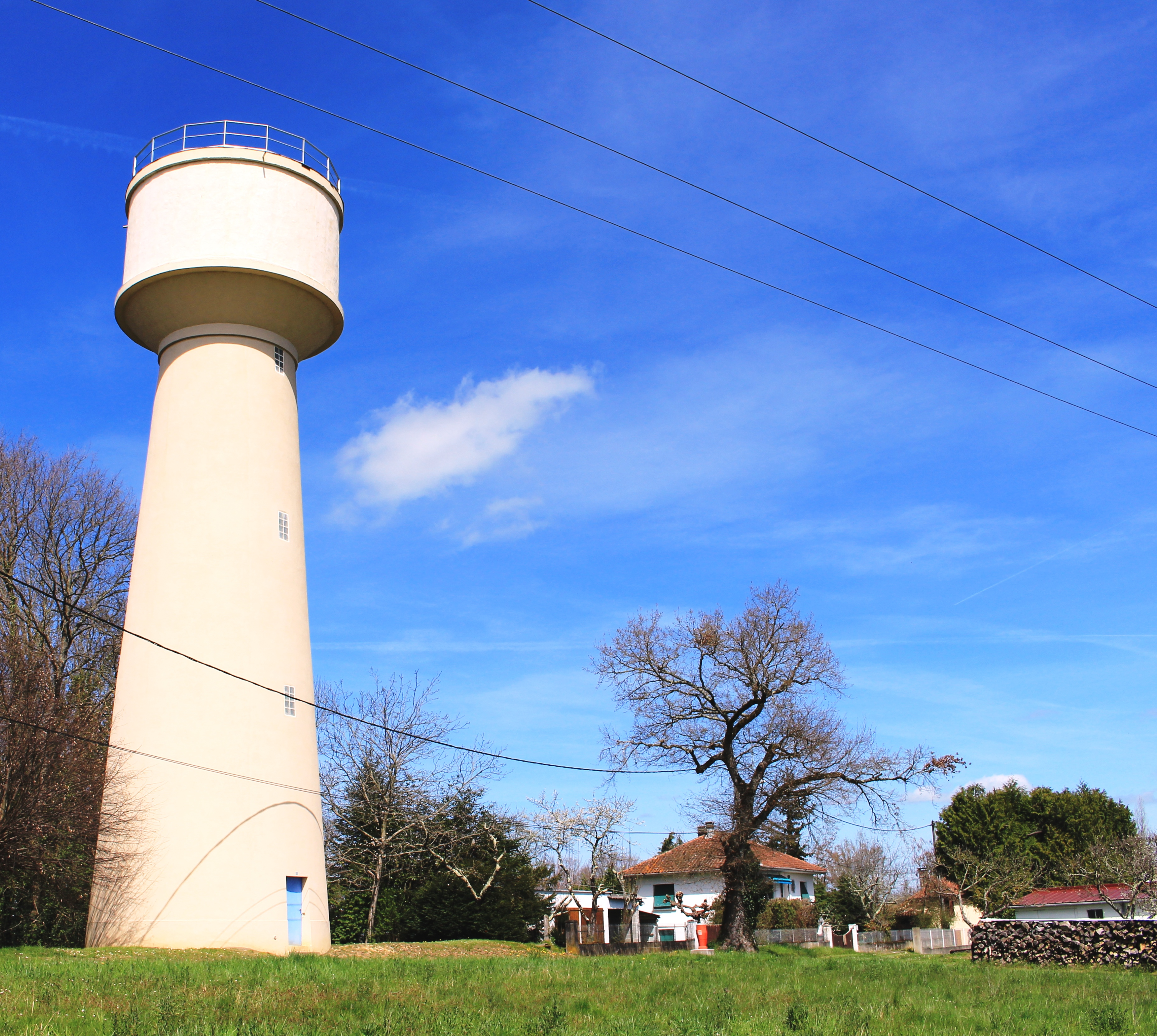 Château d'eau de Galan (Hautes-Pyrénées)